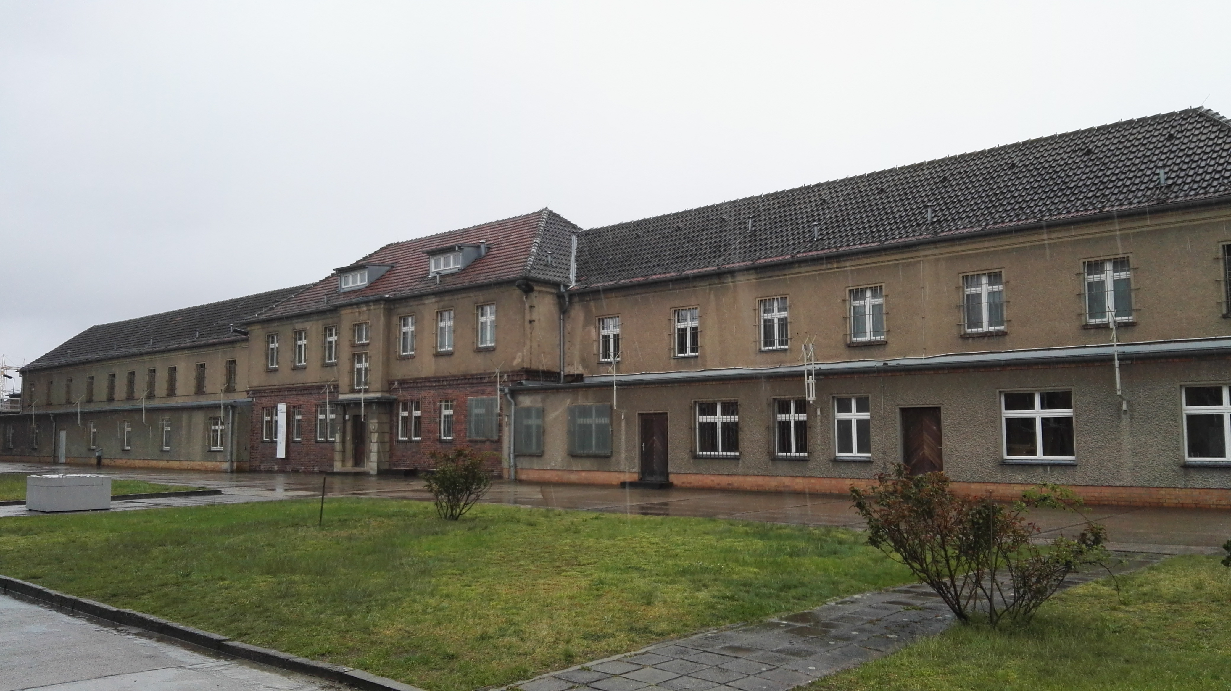 Gedenkstätte Berlin-Hohenschönhausen